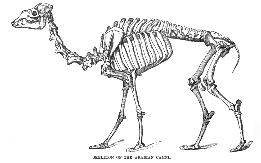 Camel Skeleton